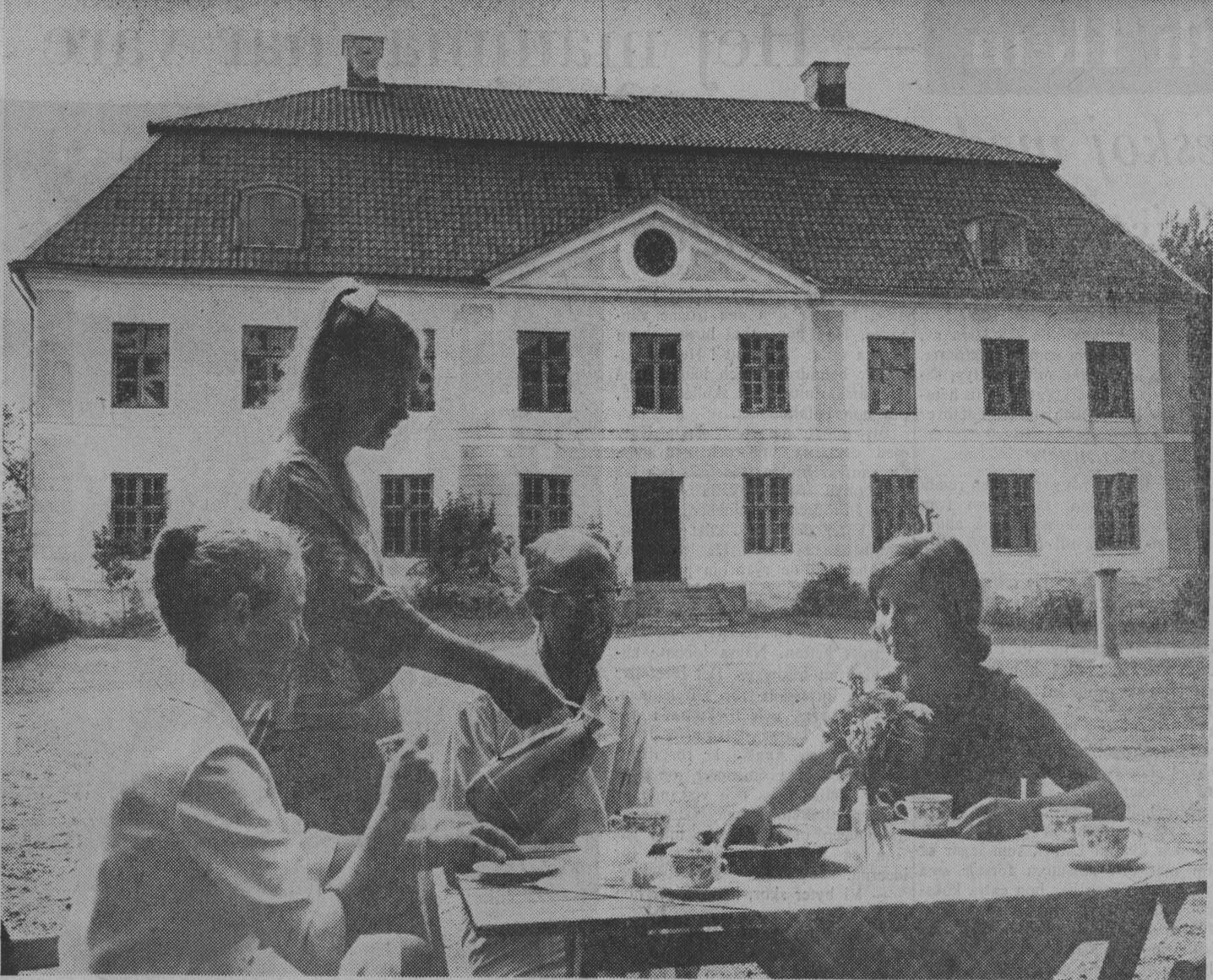 Lillemor, Birgitta, Bengt och Eva sjöberg tar paus i restaureringsarbetet av Regnaholm